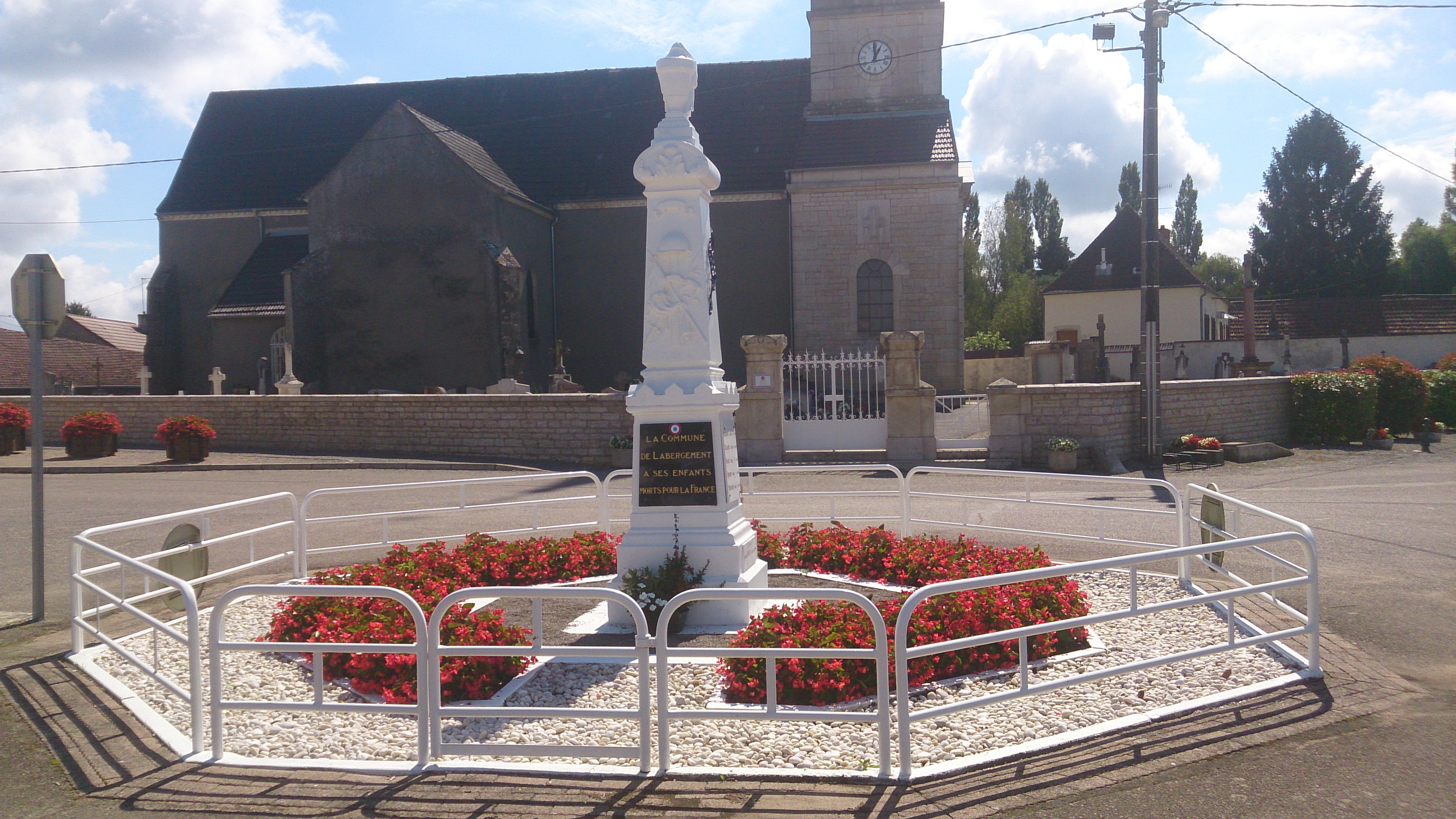 Labergement-Les-Auxonne, monument aux morts